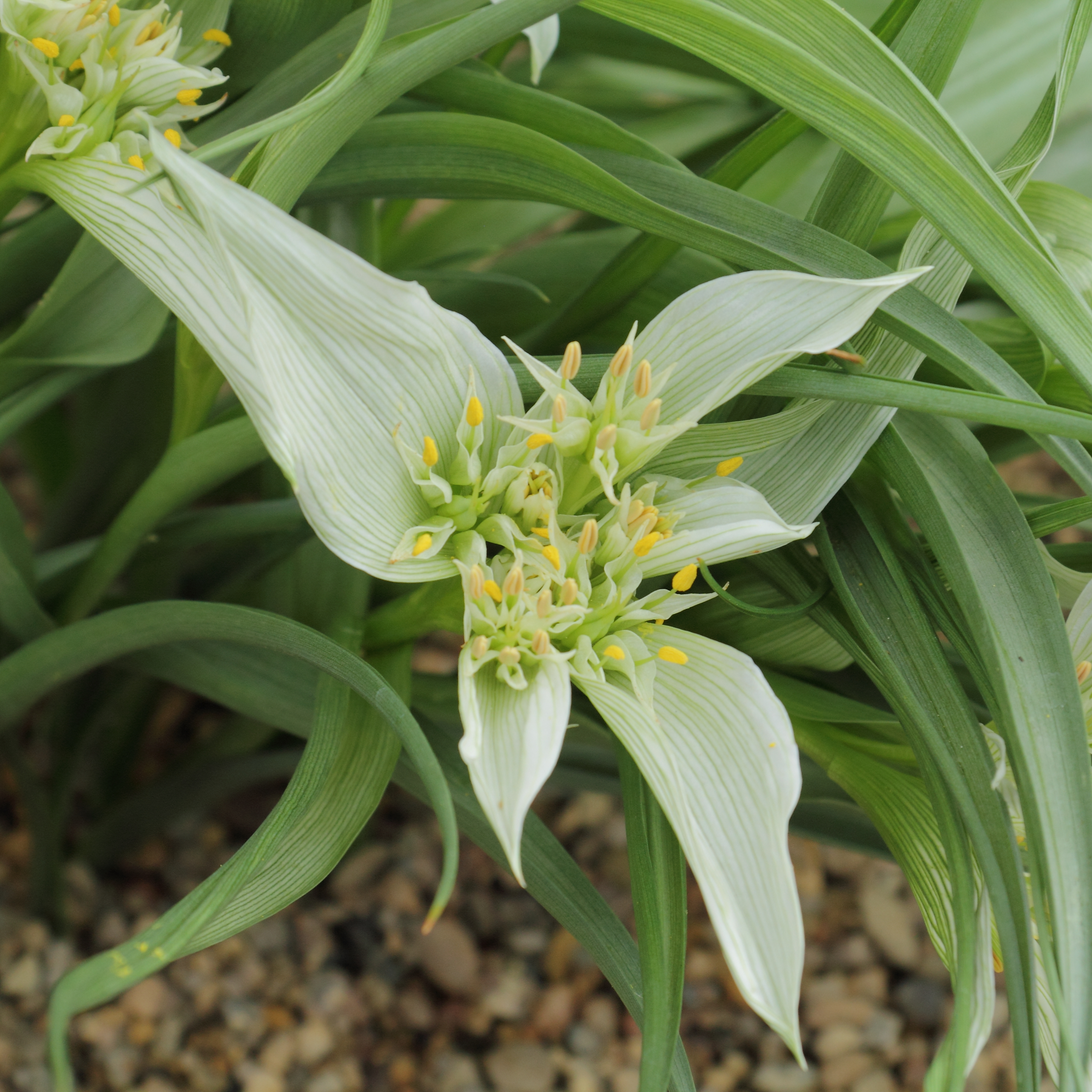 Androcymbium melanthioides, identifierad med hjälp av befintlig skylt vid Kew Gardens, London.